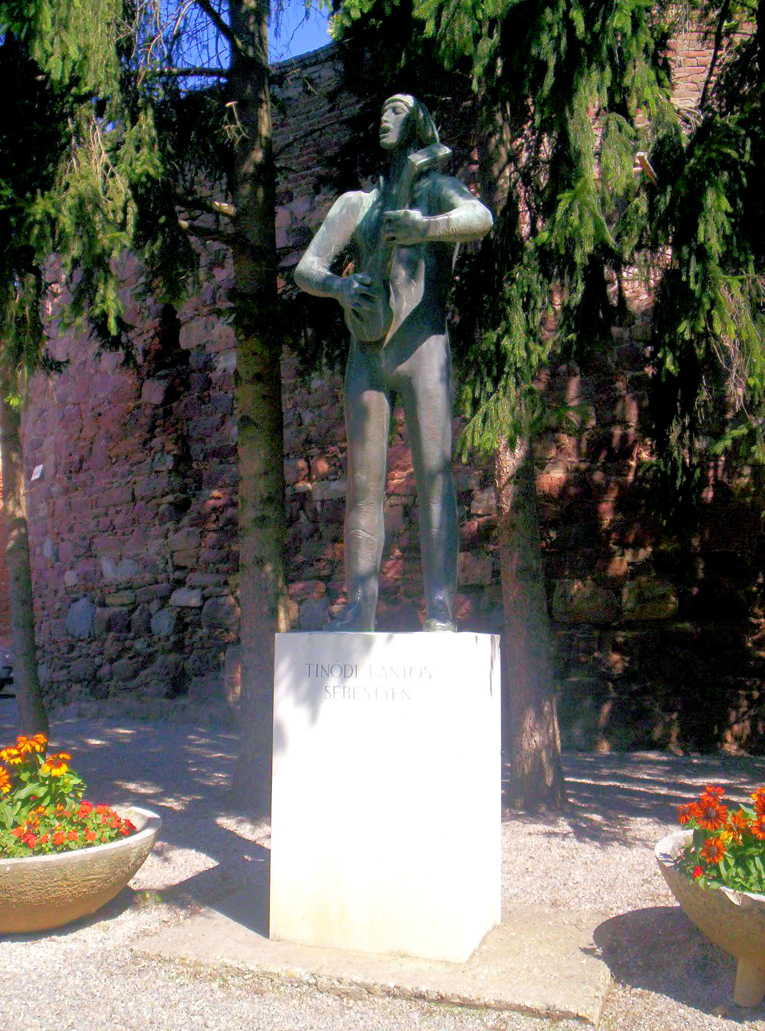 Tinódi Lantos Sebestyén szobra Szigetváron. Kiss István alkotása (1967) – photo taken by uploader User:Csanády in 2006.